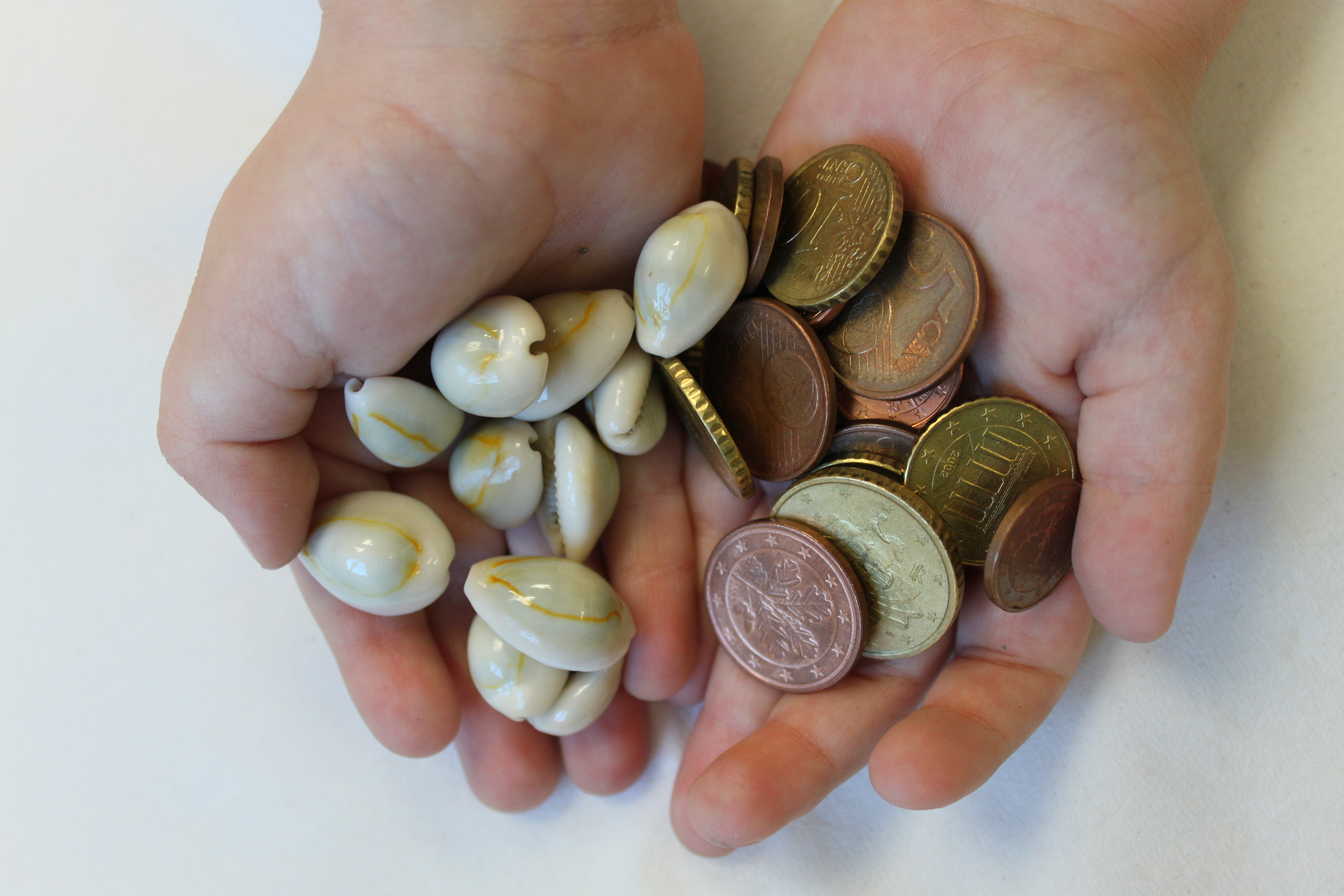 11 Gehäuse der Monetaria annulus (Ringkauri)) und Euro-Cent-Münzen, wurde als Kaurigeld verwendet; Kinderhände - 3 Jahre alt